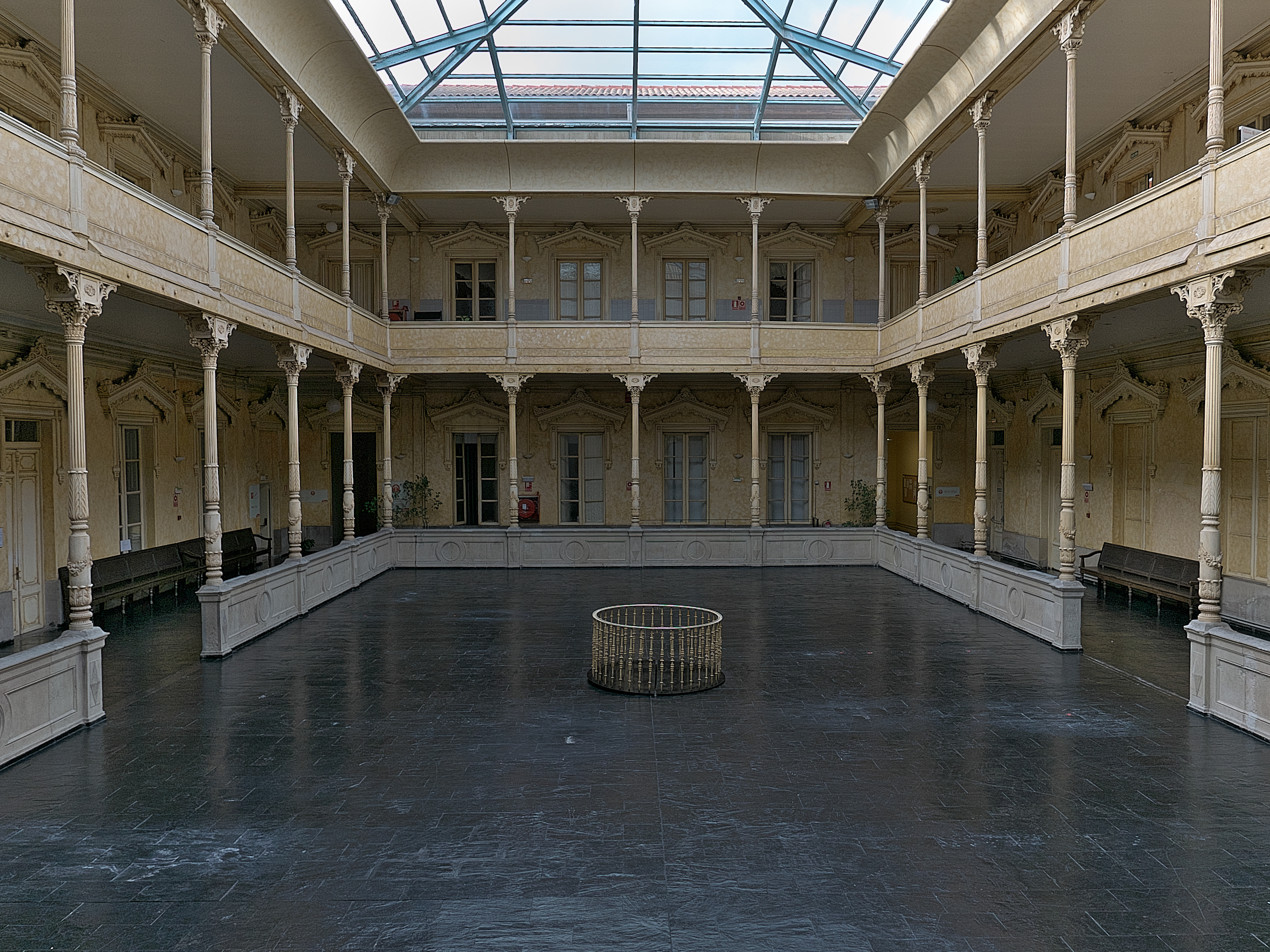 Instituto Navarro de Administración Pública, patio interior.